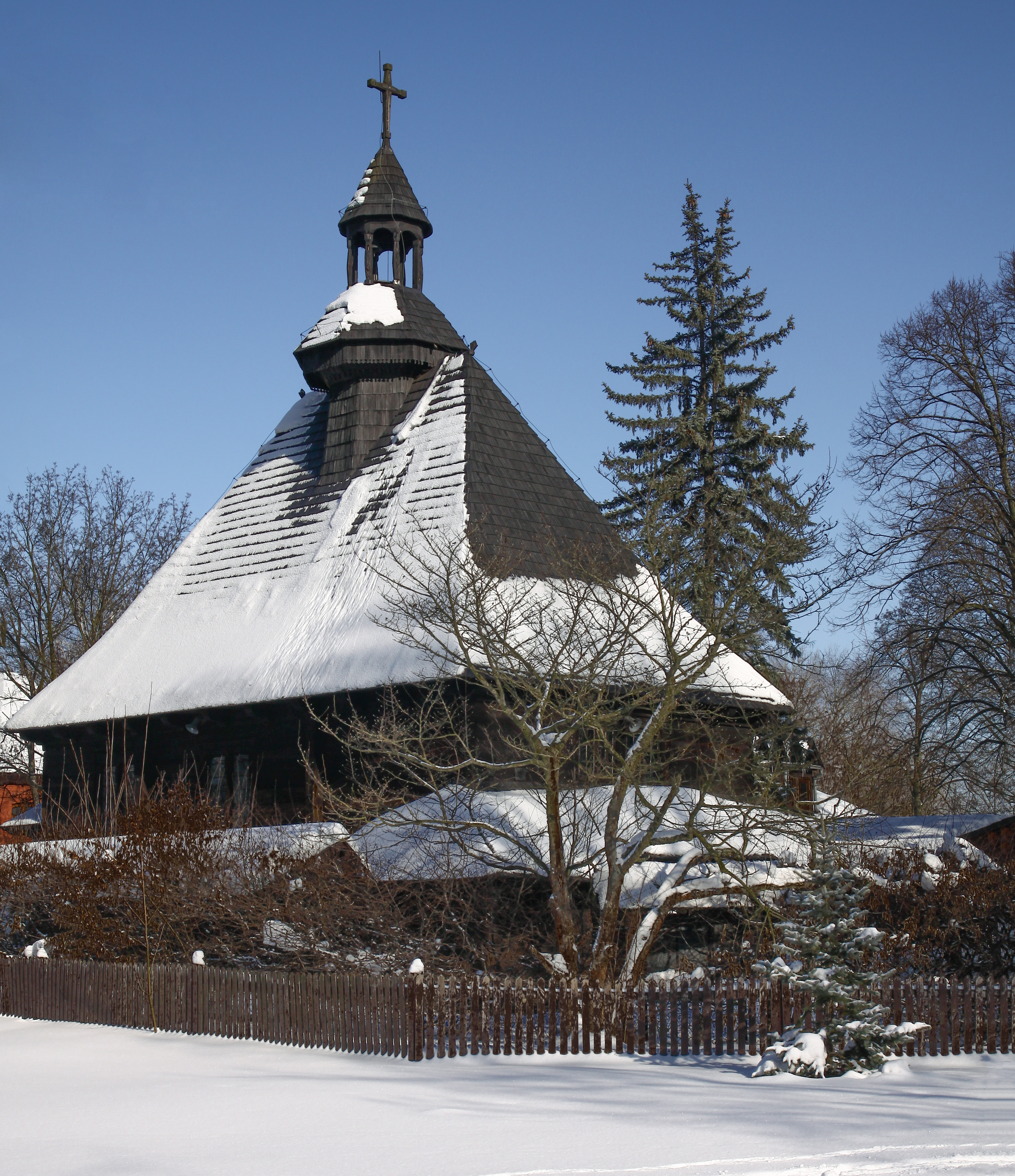 Kościół Matki Boskiej Królowej Korony Polskiej zimą.